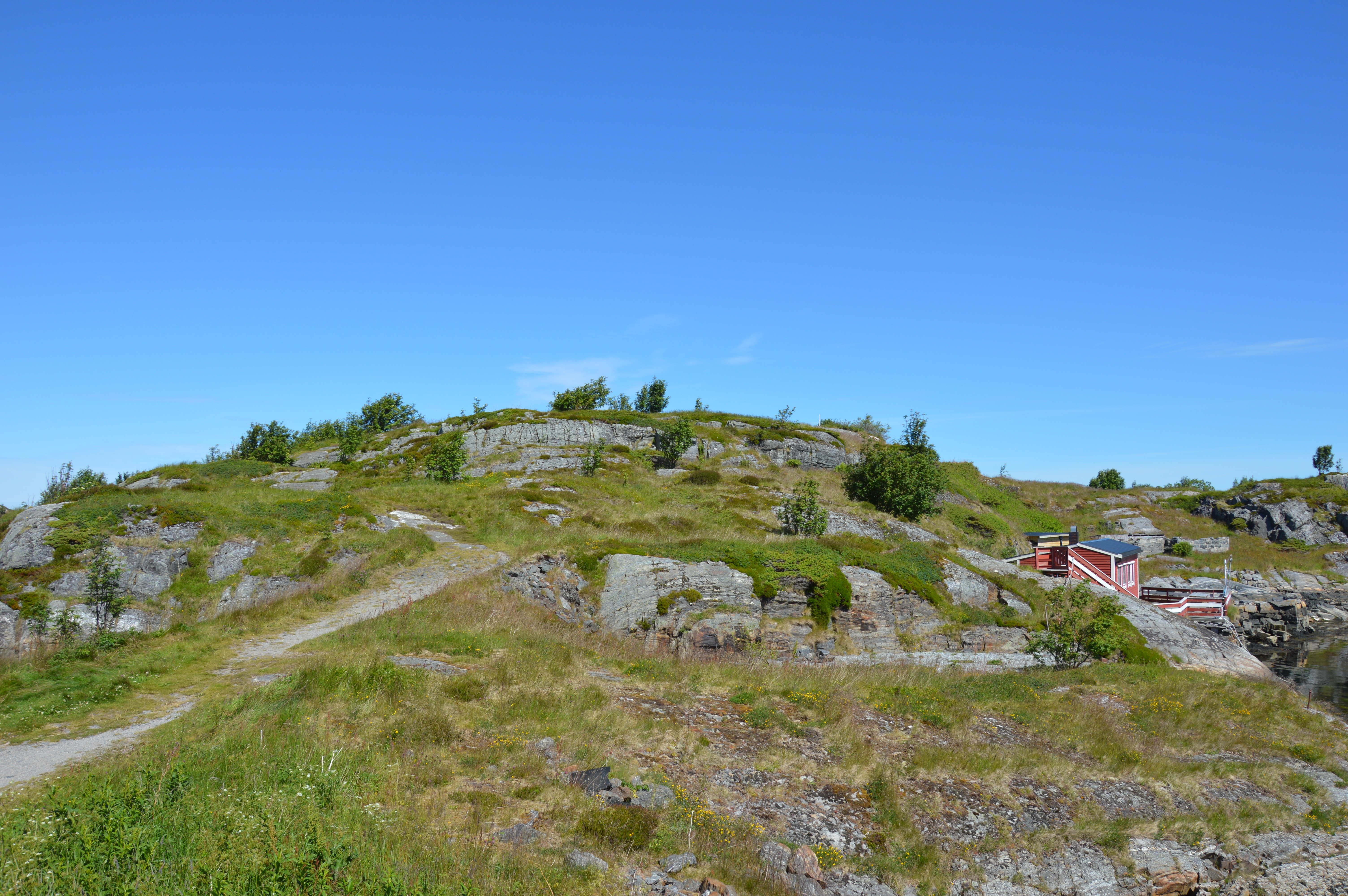 Geitøya